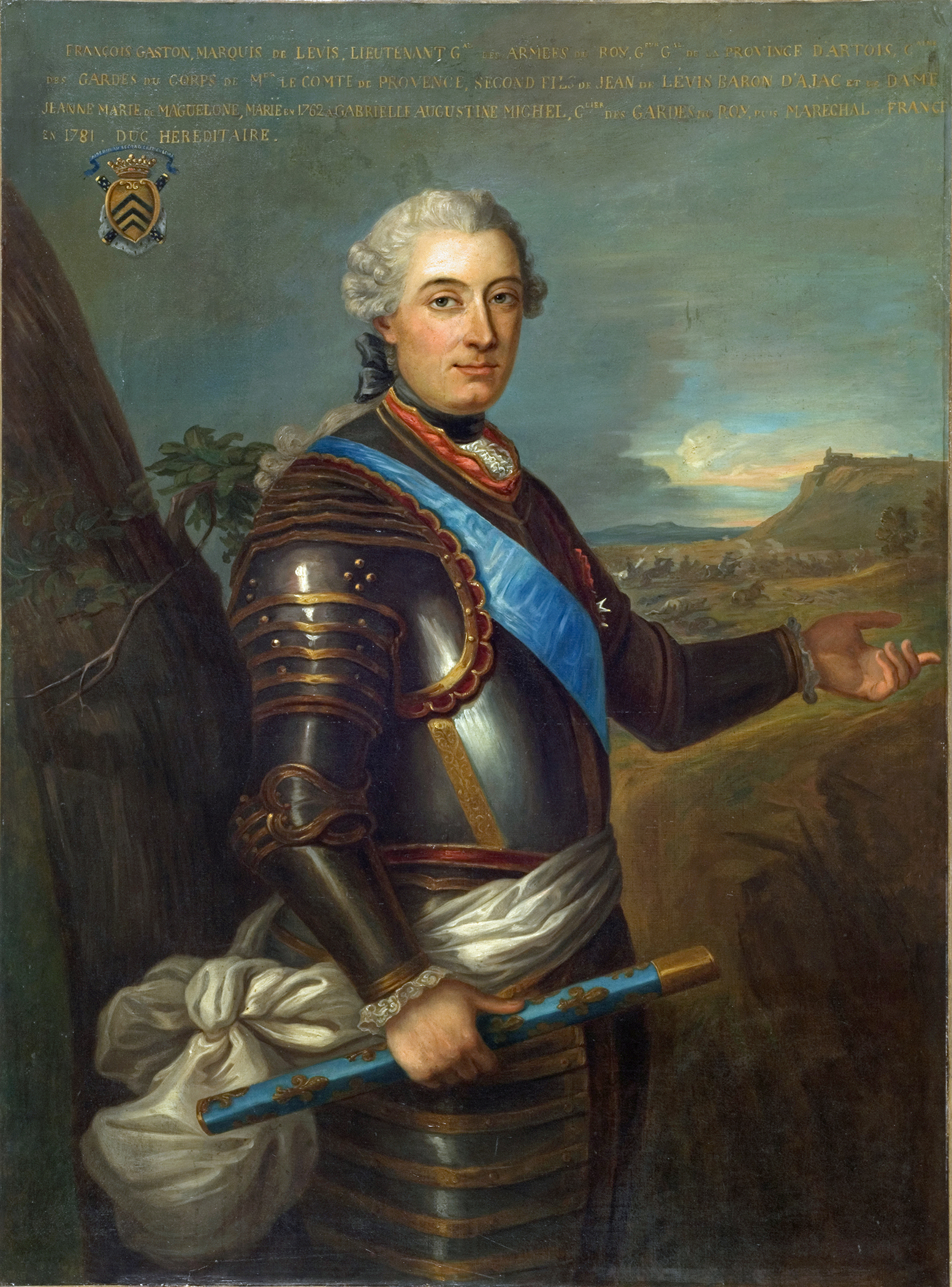 François Gaston de Lévis représenté avec le bâton de maréchal